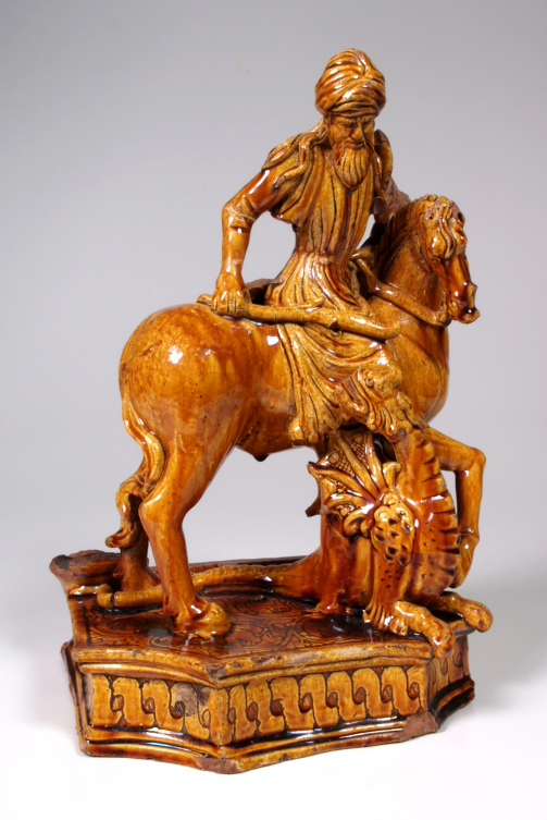 Gruppo in maiolica ferrarese del XVI secolo